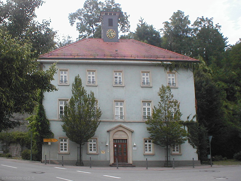 Altes Schulhaus und Rathaus in Billigheim (Baden)